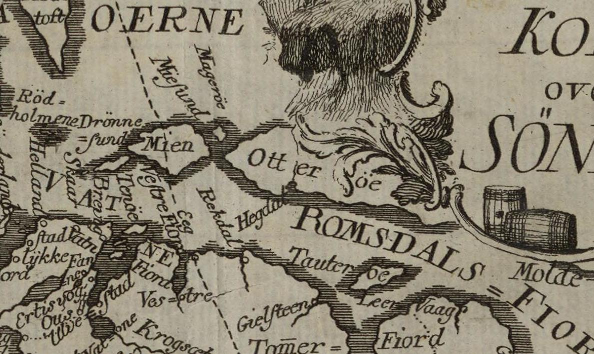 Illustrasjon hentet fra boken "Physisk og Oeconomisk Beskrivelse over Fogderiet Søndmør, beliggende i Bergens Stift i Norge" av Strøm, Hans og utgitt av Trykt hos Jonas LindgrenSorøe : Trykt hos Jonas Lindgren, 1762-1766 (Sorøe, 1762)